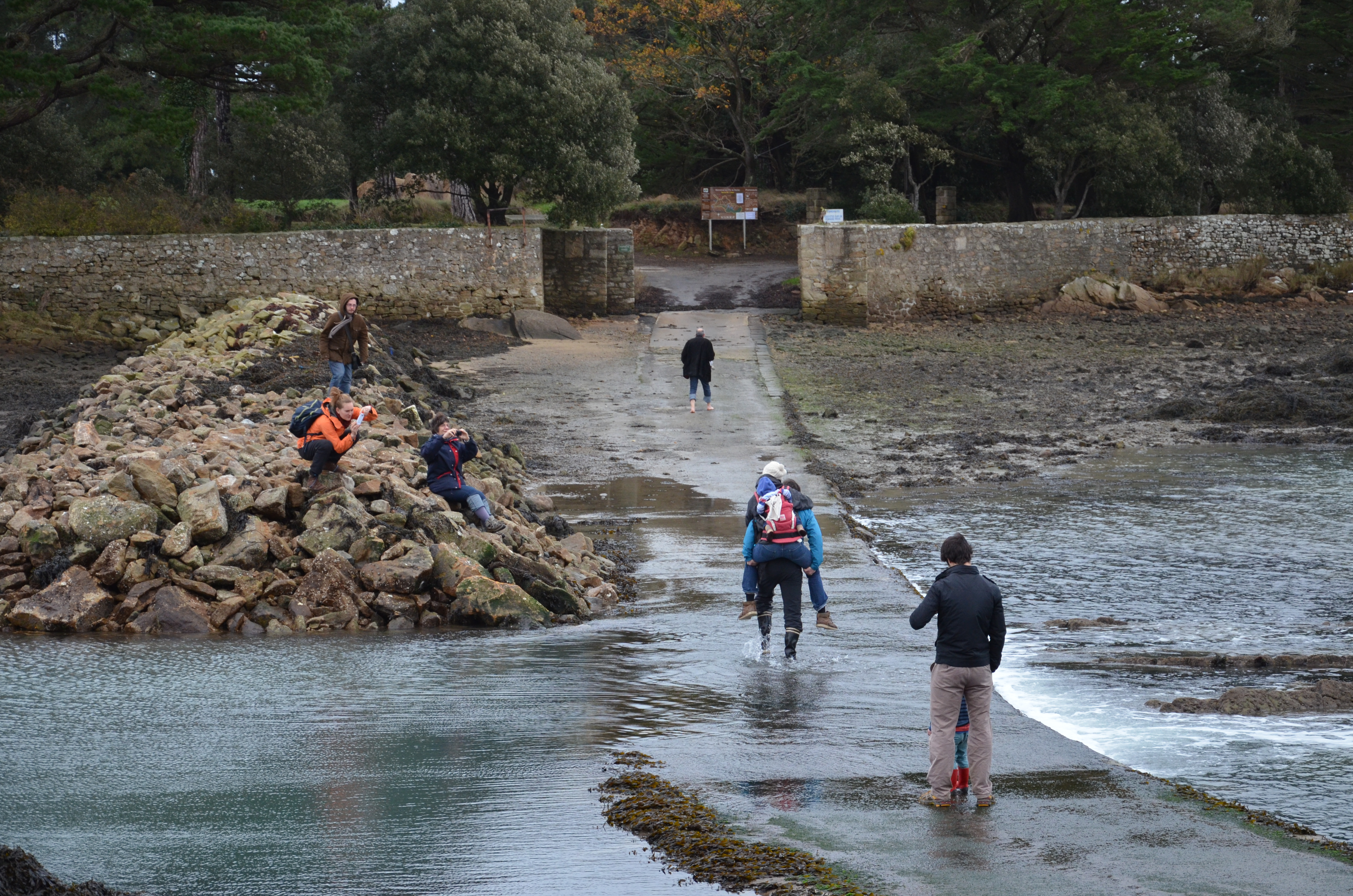 Personnes traversant à pieds la chaussée submersible reliant l'île de Berder au continent, à marée descendante.